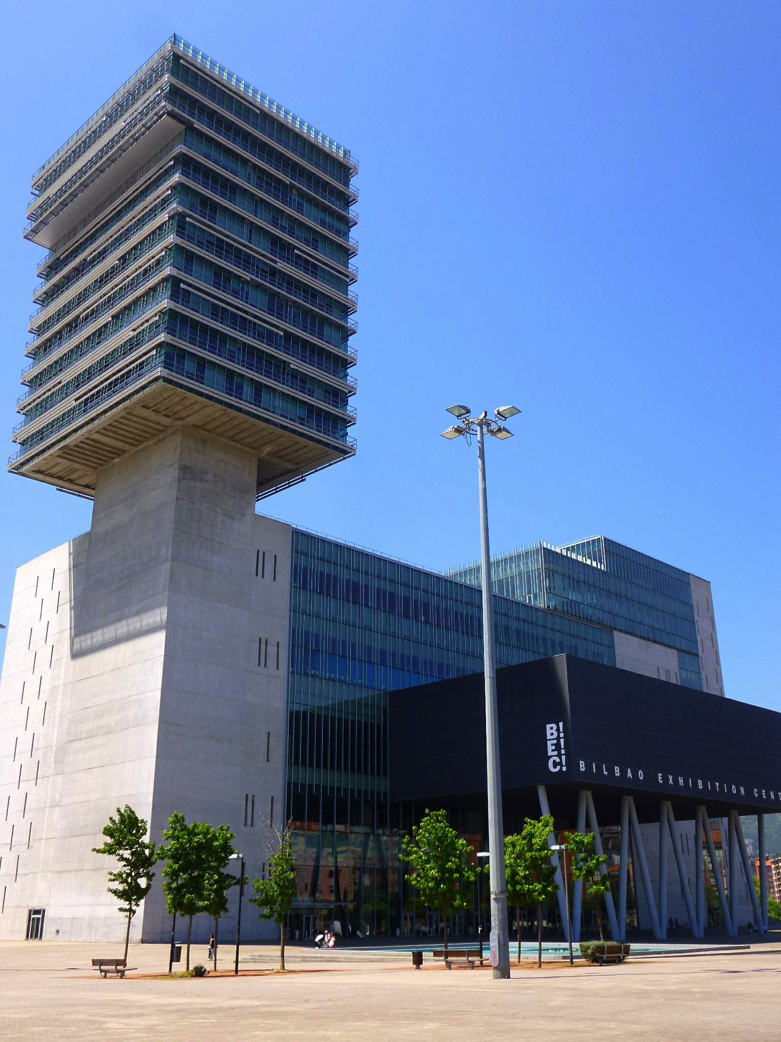 Bilbao Exhibition Center (BEC), en Barakaldo, Bizkaia